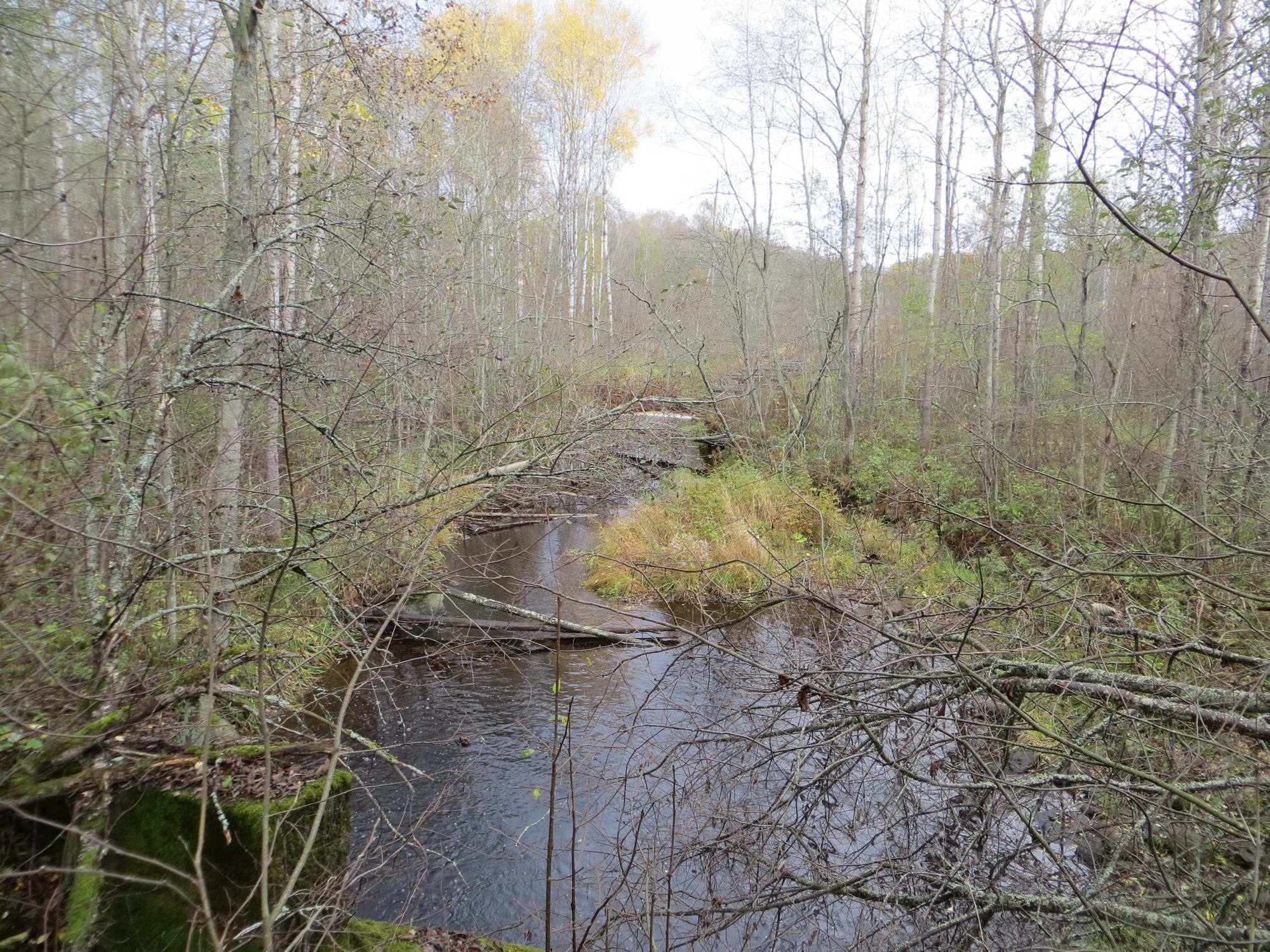 Река Морье в урочище Пурново. Вид на восток